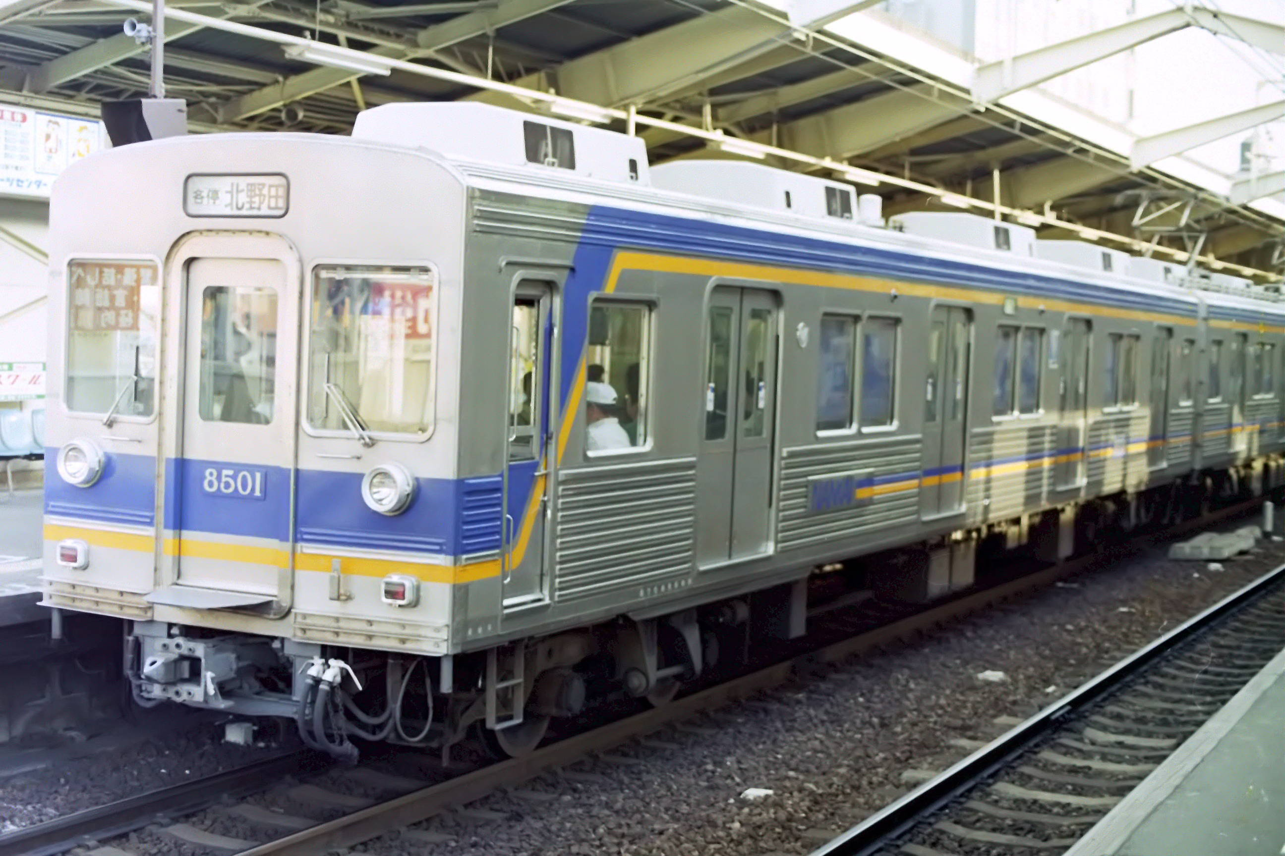 南海8000系(初代) 8501